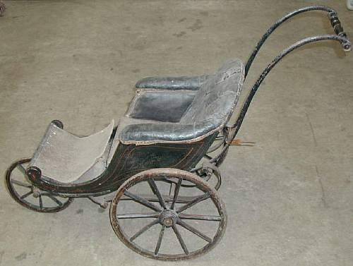 wandelwagen met drie wielen uit de periode 1840-1850